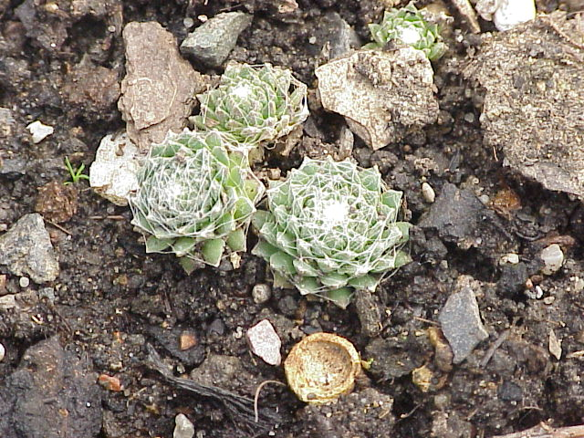 Species: Sempervivum arachnoideum tomentosum Family: Crassulaceae Image No. 2